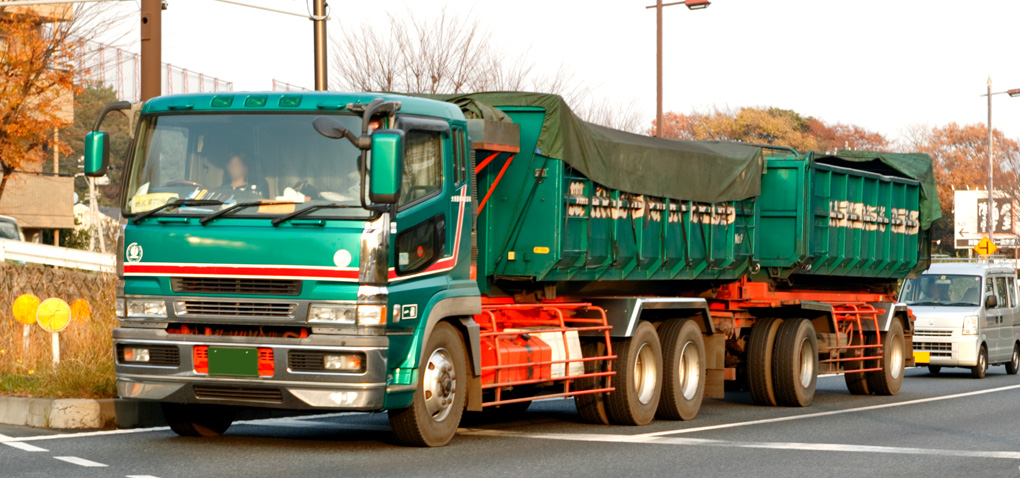 Trailer dump truck